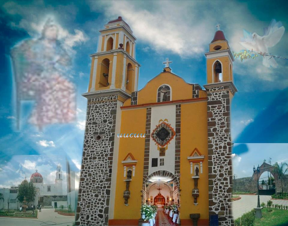 iglesia de santa maria del monte This image contains digital watermarking or credits in the image itself. The usage of visible watermarks is discouraged. If a non-watermarked version of the image is available, please upload it under the same file name and then remove this template. Ensure that removed information is present in the image description page and replace this template with metadata from image or attribution metadata from licensed image . Caution: Before removing a watermark from a copyrighted image, please read the WMF's analysis of the legal ramifications of doing so, as well as Commons' proposed policy regarding watermarks. If the old version is still useful, for example if removing the watermark damages the image significantly, upload the new version under a different title so that both can be used. After uploading the non-watermarked version, replace this template with superseded|new filename|version without watermarks .